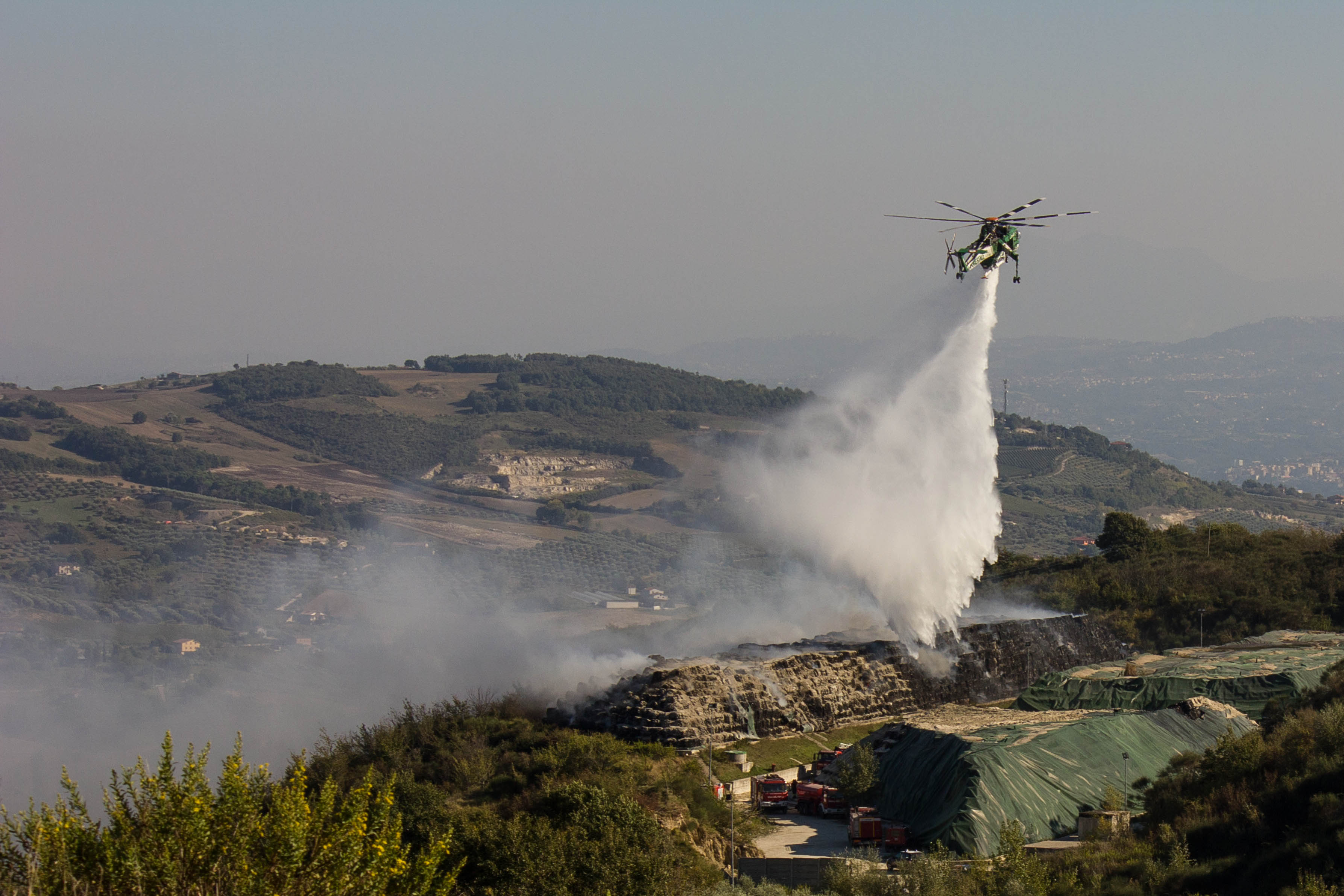 Ericksson